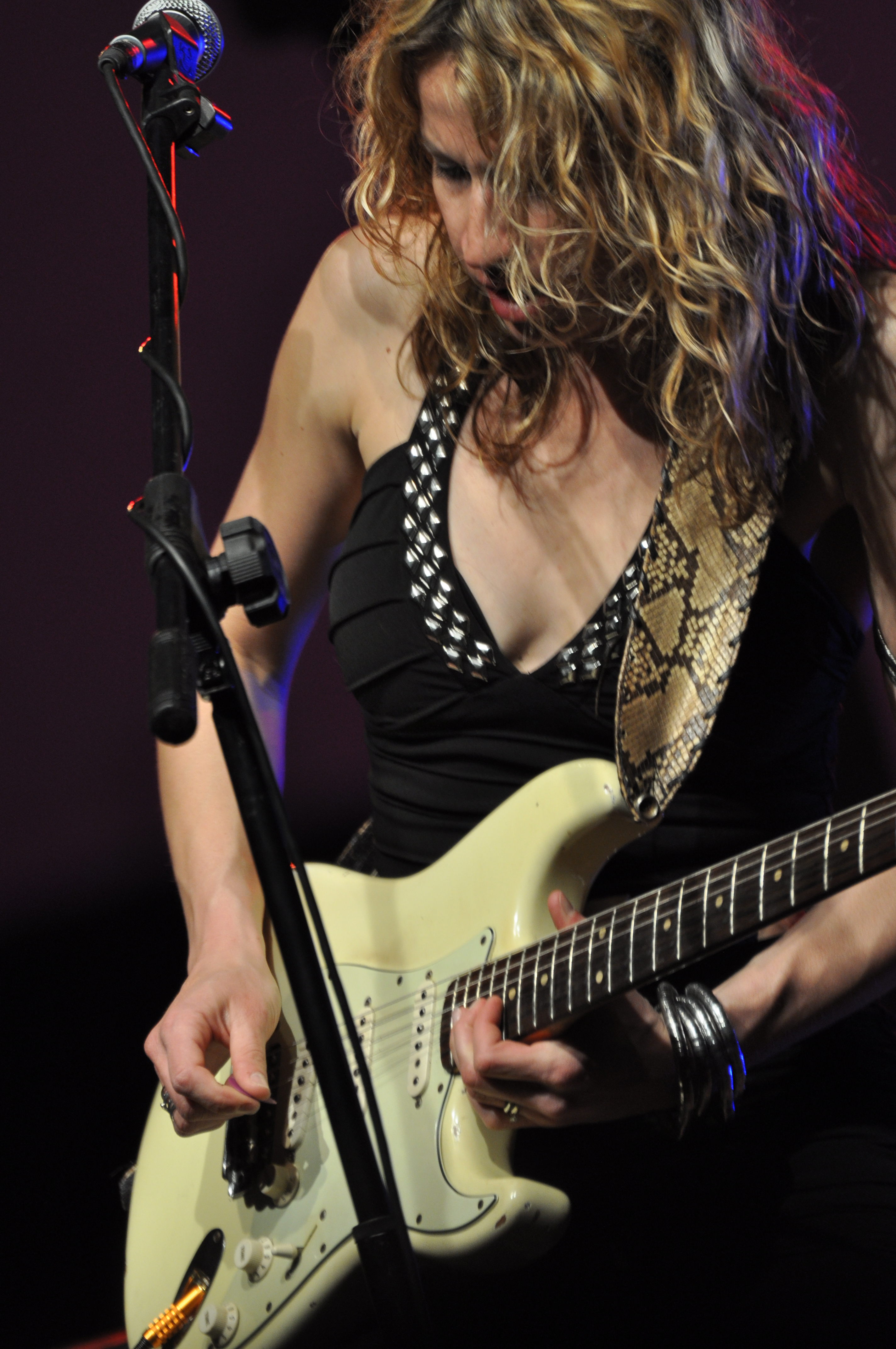 Ana Popovic